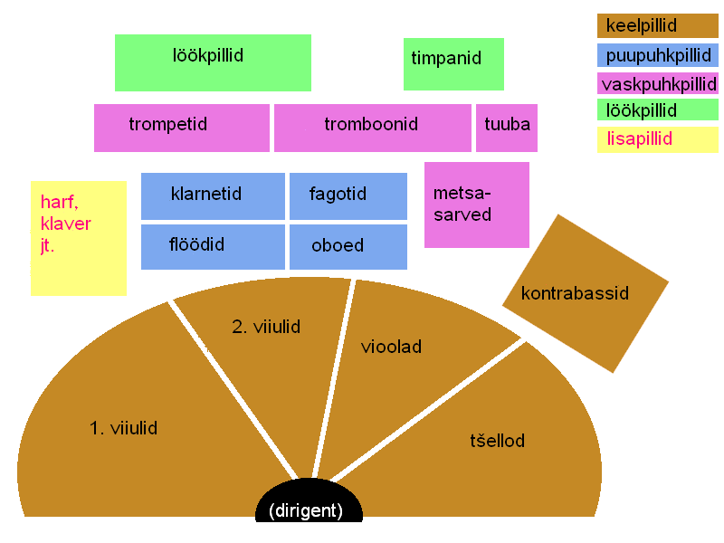 Sümfooniaorkester